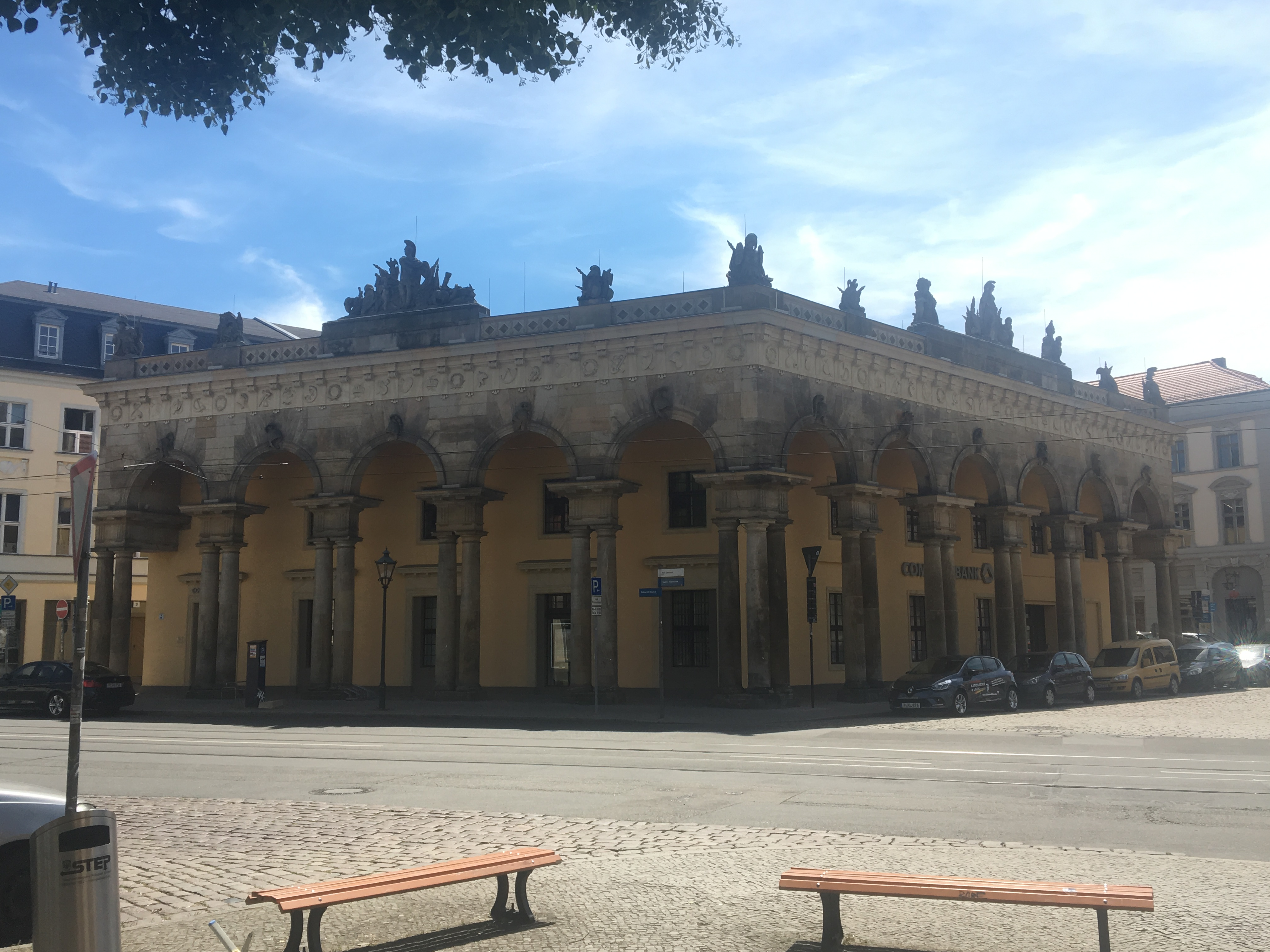 Alte Wache im Verlauf der Charlottenstraße in Potsdam.